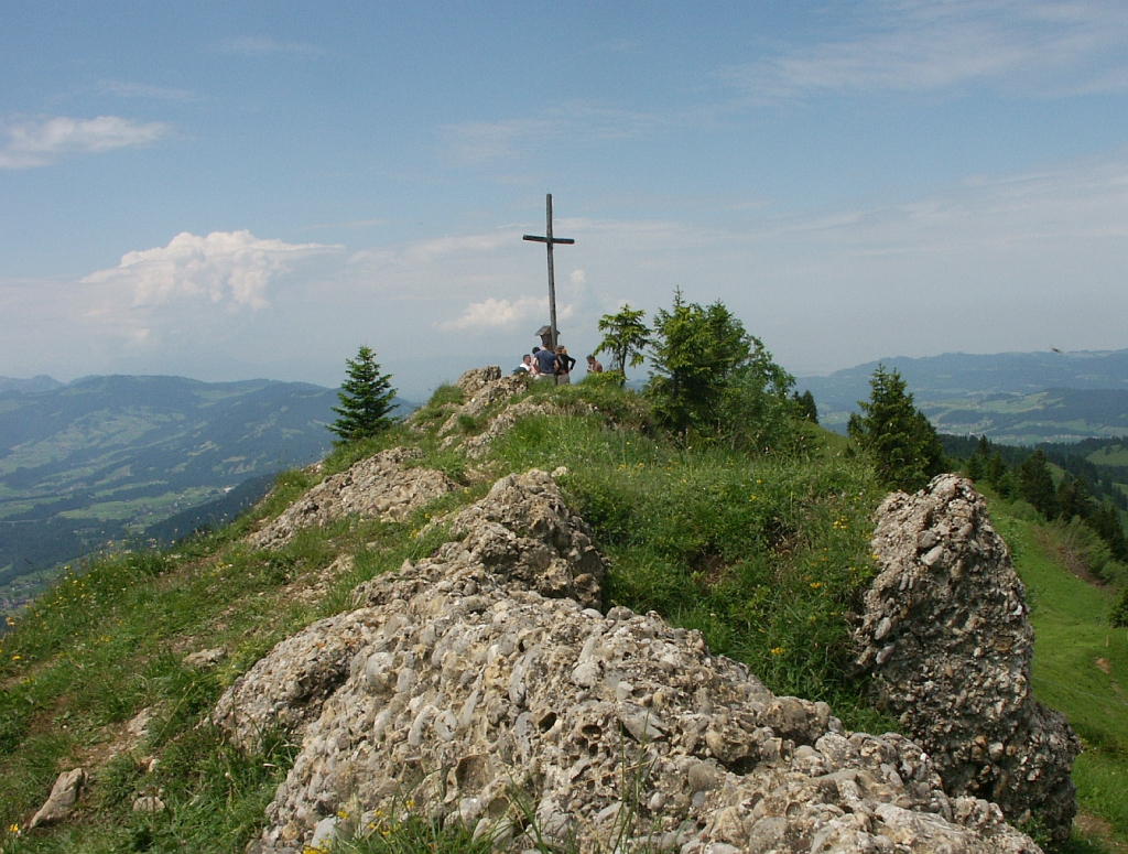 Hochhädrich, Austria